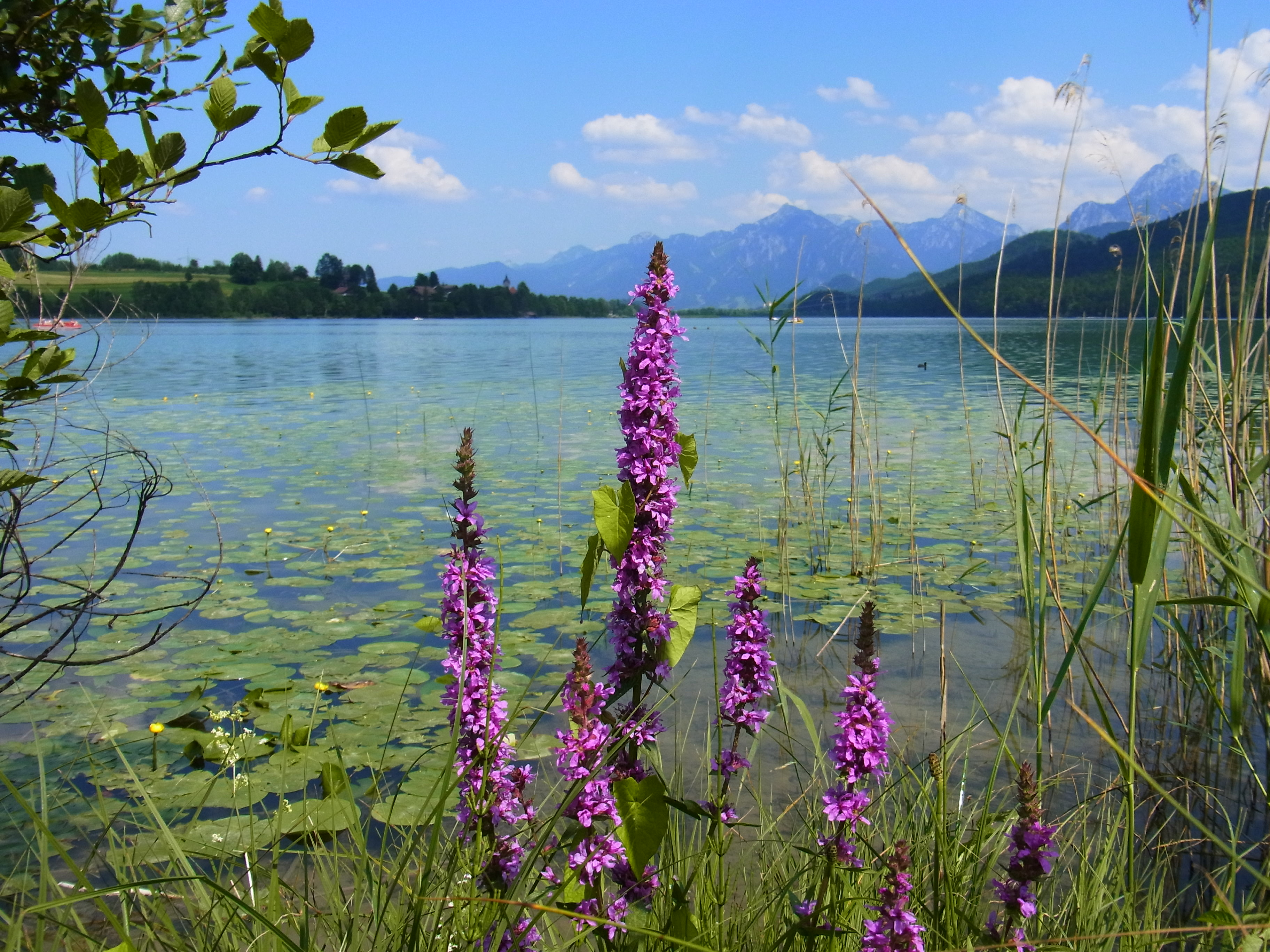 Der Weißensee